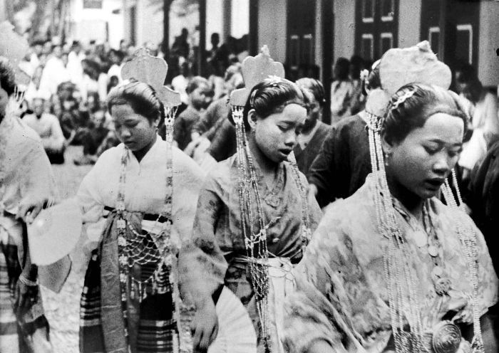 Repronegatief. Hofdames in Bone, Celebes